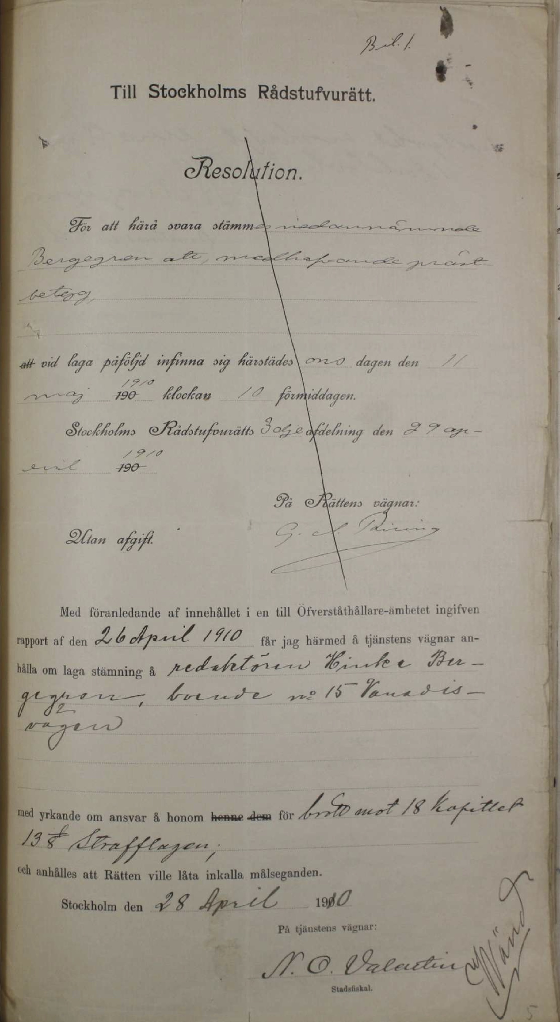 Stämningsbegäran (häktning) av Hinke Bergegren, utfärdad av Överståthållarämbetet för polisärenden/Nils Olof Valentin den 28 april 1910. SE/SSA/0140/04/03/Stockholms rådhusrätt avd. 3, Brottmål/Protokoll 1910, nr. 240